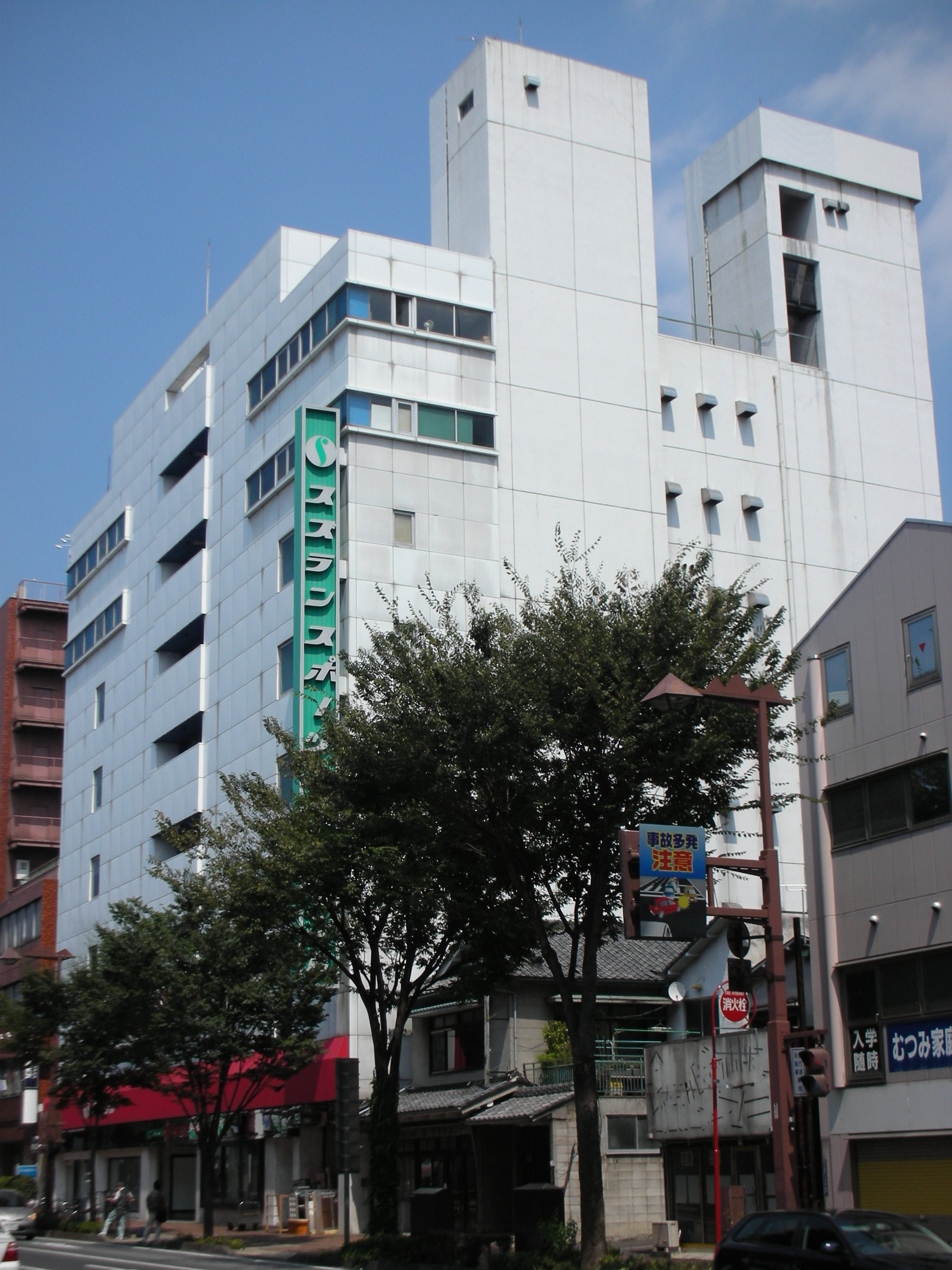 スズラン前橋店スポーツファッション館の外観